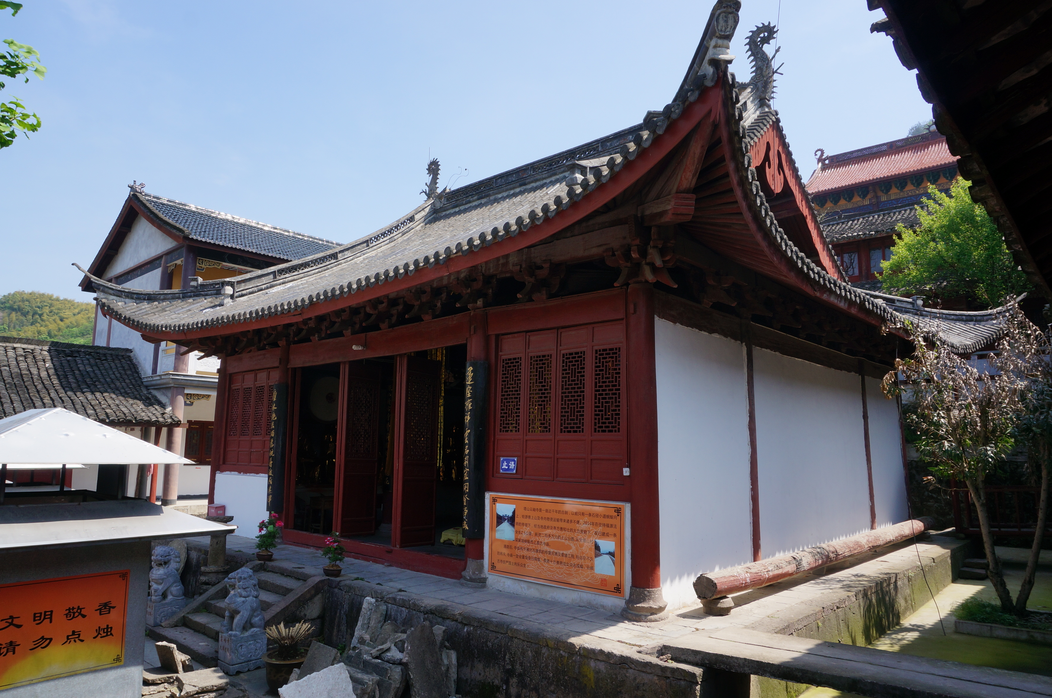 云岫寺，大雄宝殿西南面。